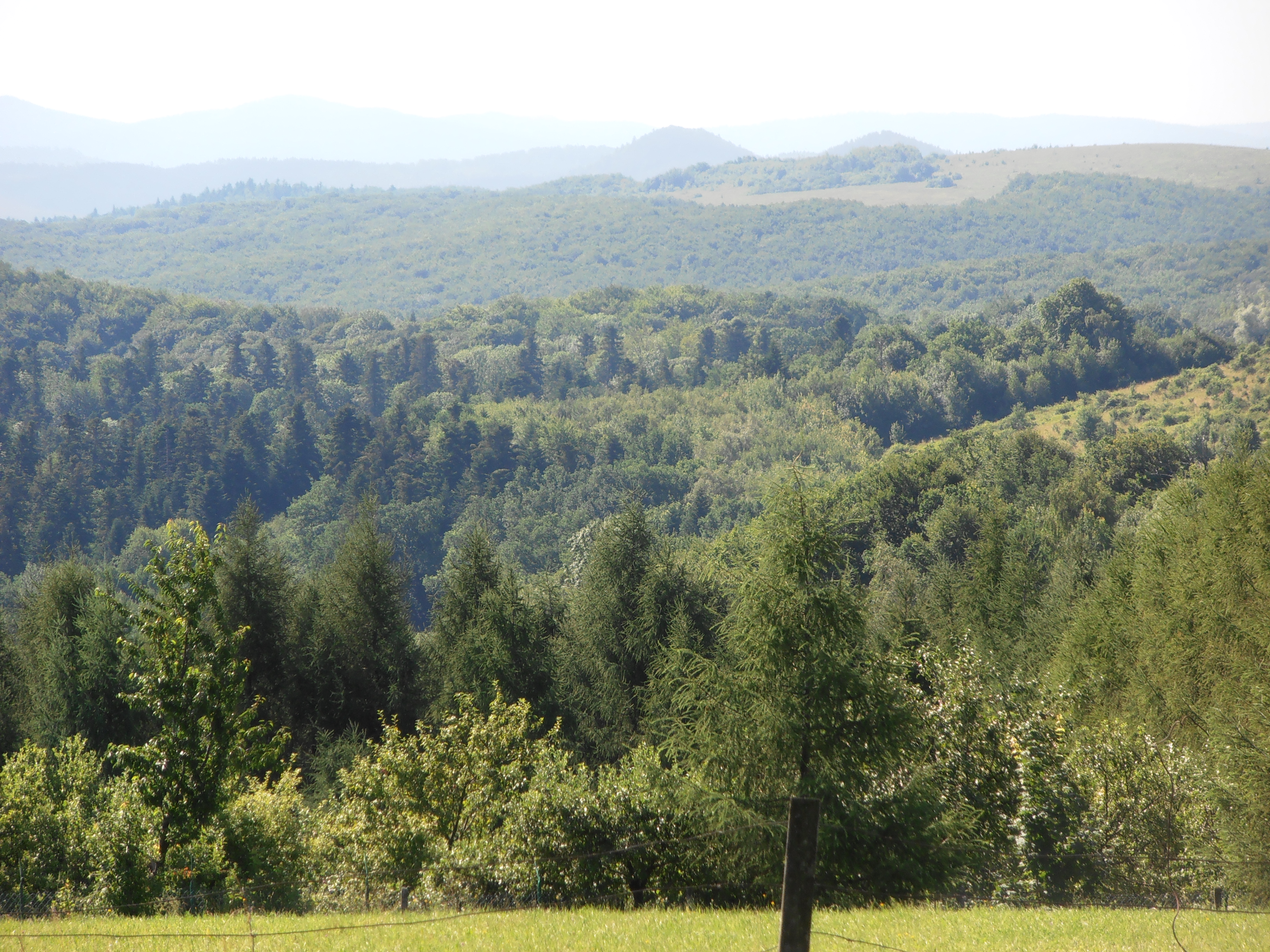 Park krajobrazowy Park Krajobrazowy Pogórza Przemyskiego.